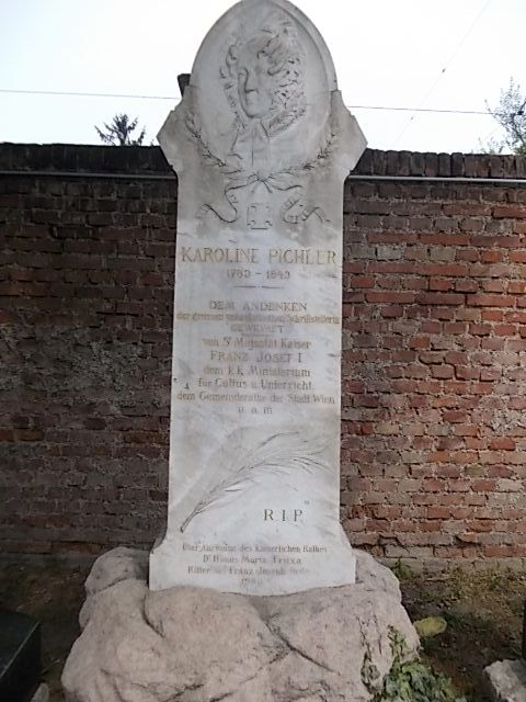 Caroline Pichler Grabstätte